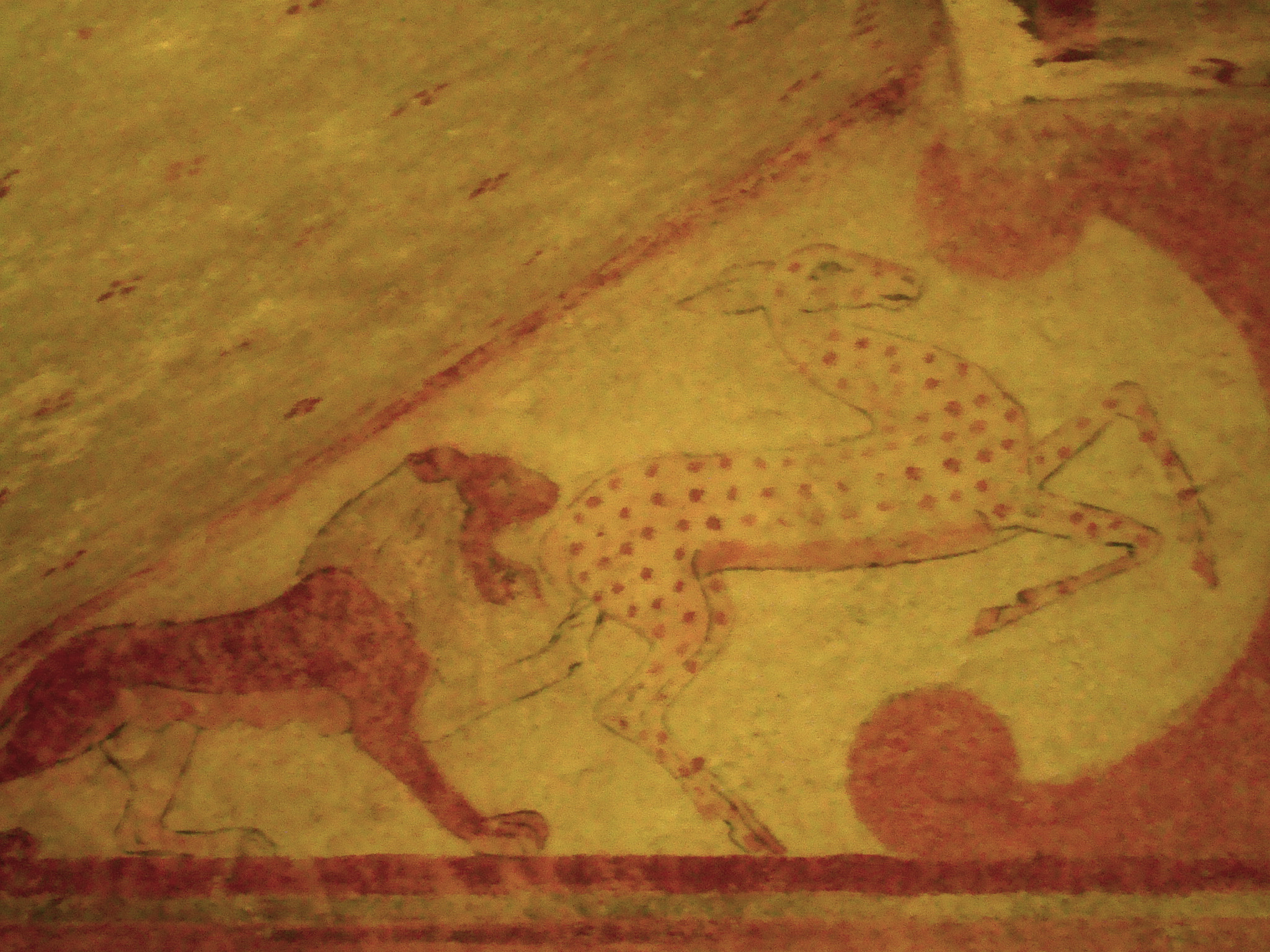 Tomba dei Baccanti - Nécropole de Monterozzi - Museo archeologico nazionale tarquiniense - MIBAC - Tarquinia This is a photo of a monument which is part of cultural heritage of Italy.